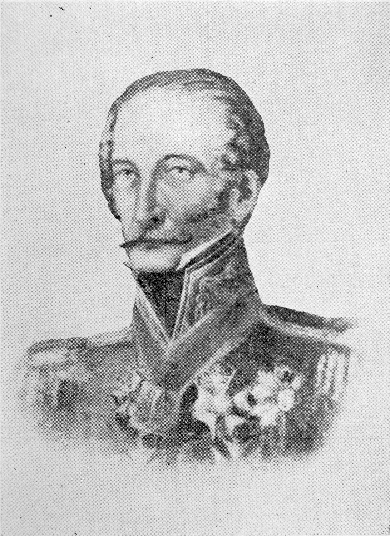 Retrato del militar y político portugués, Carlos Federico Lecor (1767 - 1836)